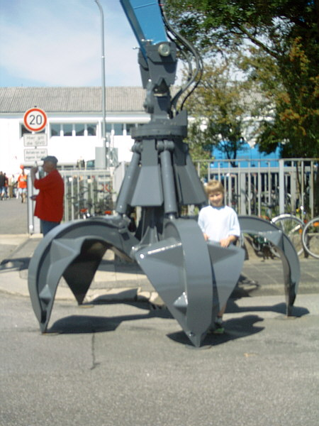 Terex MHL 585 beim Tag der Offenen Tür zum 50. Jubiläum des Baggerherstellers Terex-Fuchs in Bad Schönborn